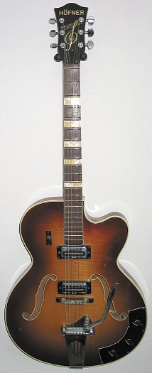 Höfner Semiakustik 60/70er Jahre